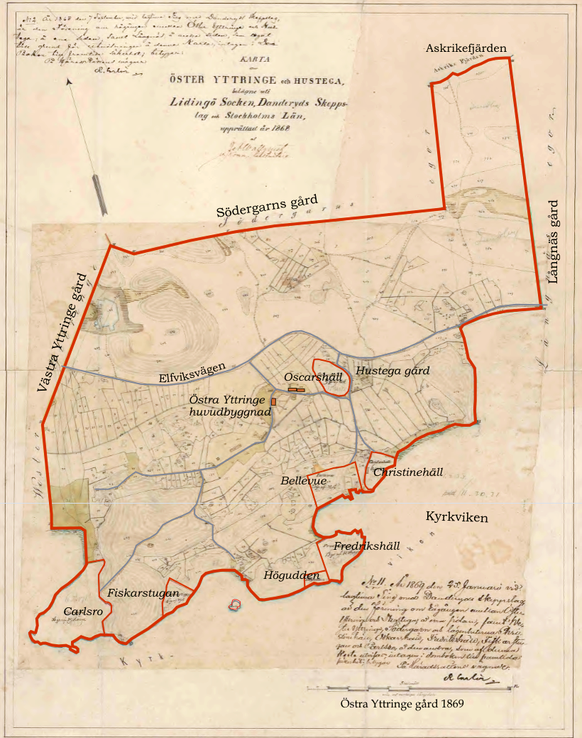 Fastighetskarta över Östra Yttringe gård efter sammanslagning med Hustega gård. Situation 1869.